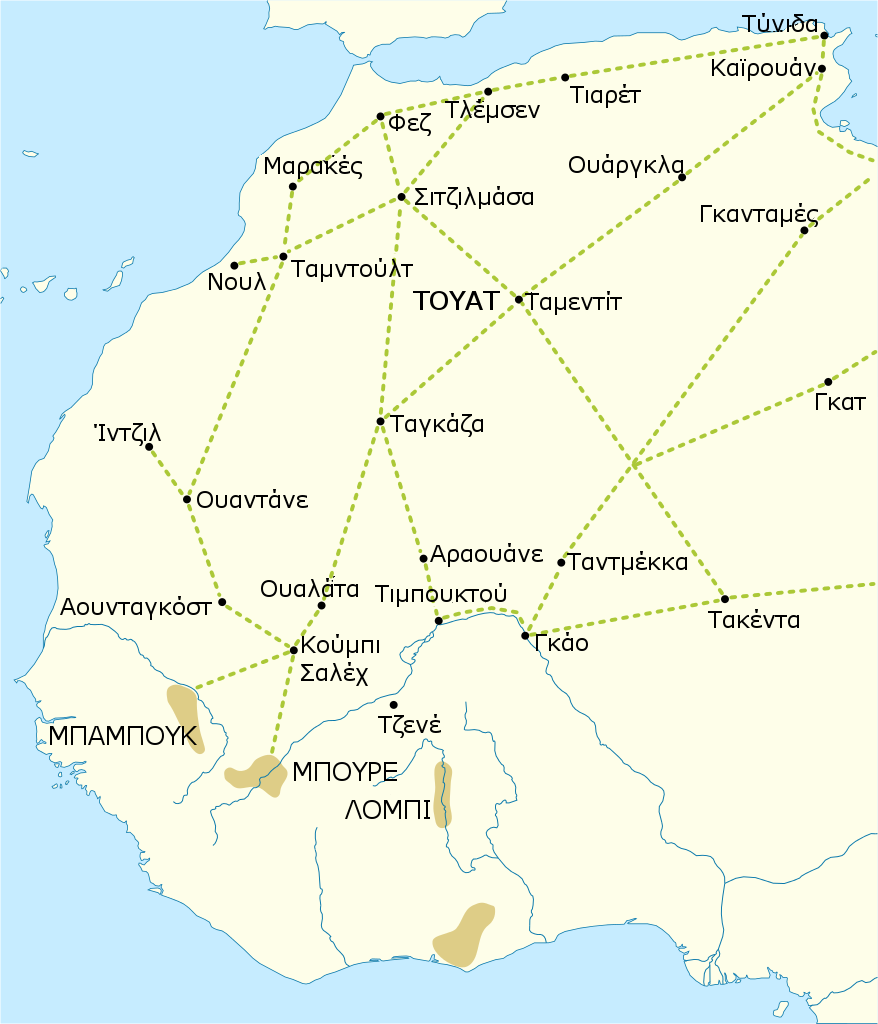 Εμπορικές διαδρομές στη Δυτική Σαχάρα την περίοδο ~1000 - 1500. Τα χρυσωρυχεία απεικονίζονται με μπεζί χρωματισμό.